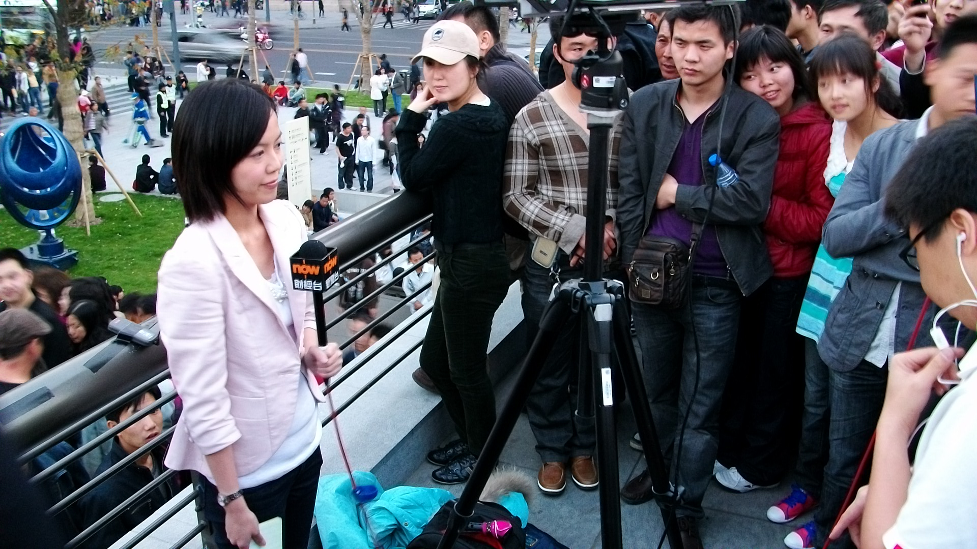 中文（中国大陆）: Now新闻台记者于2010年4月30日在上海外滩报道上海世博开幕新闻。